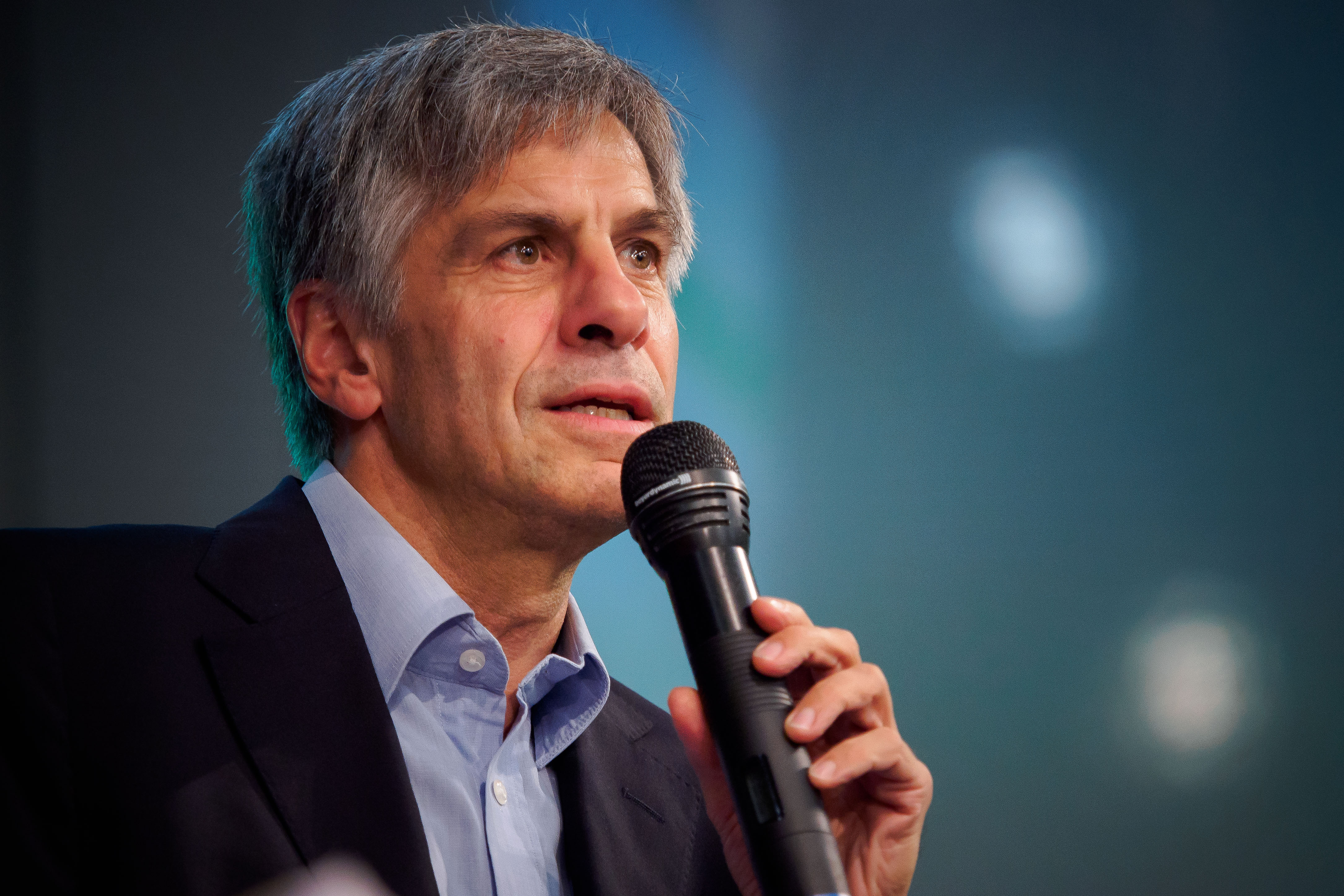 Gerald Häfner (Publizist, ehem. verfassungspol. Sprecher Grünen Fraktion im Europaparlament) Foto: Stephan Röhl